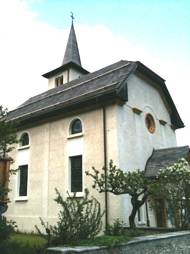 Pfarrkirche in Inden VS, Kanton Wallis